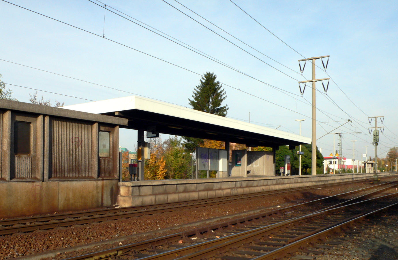 Bahnhof Nürnberg-Mögeldorf, Blick von Westen auf den Bahnsteig